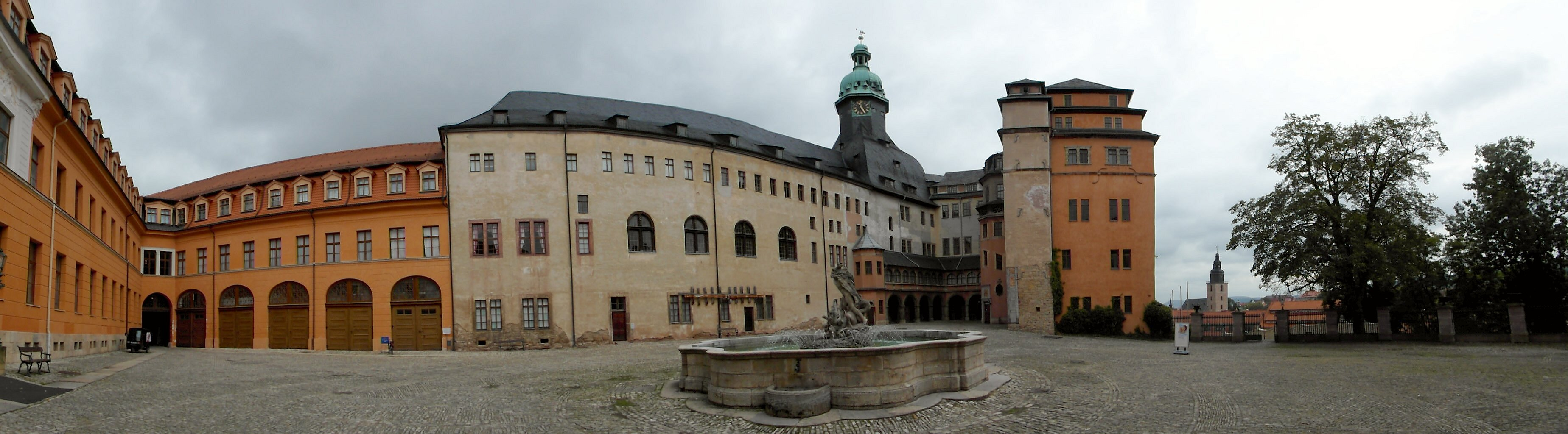 Schloss Sondershausen, hier residierten die Schwarzburger